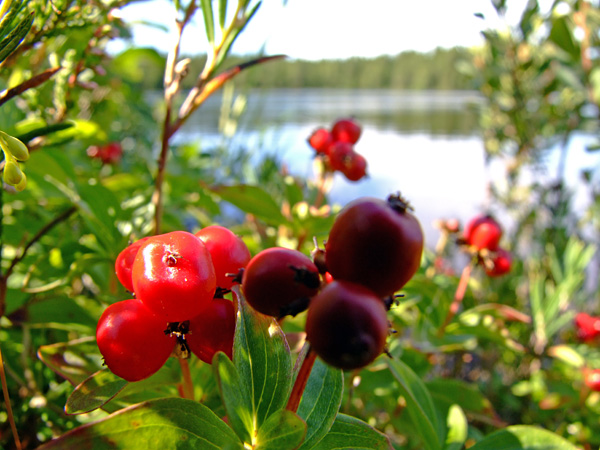 Cornus suecica